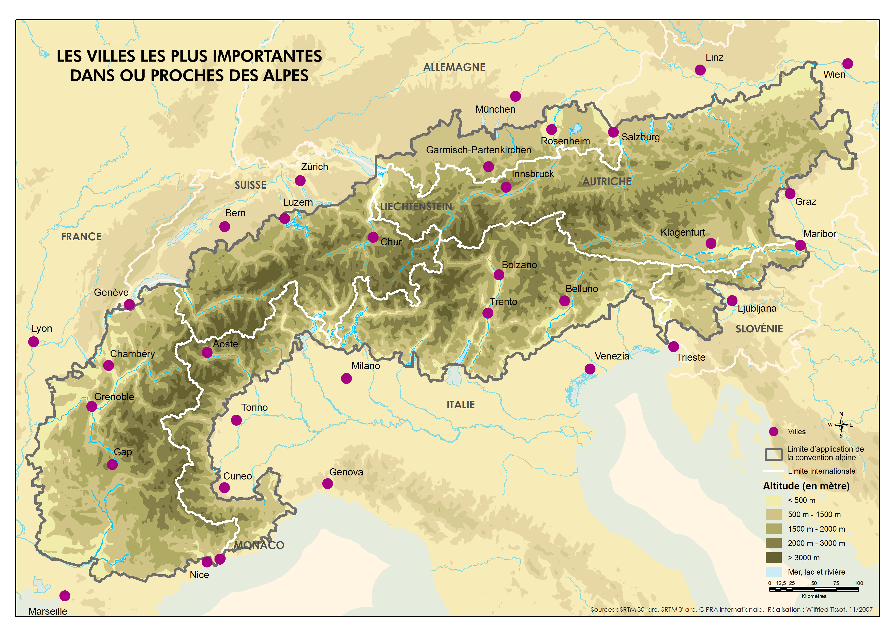 Les villes des Alpes.